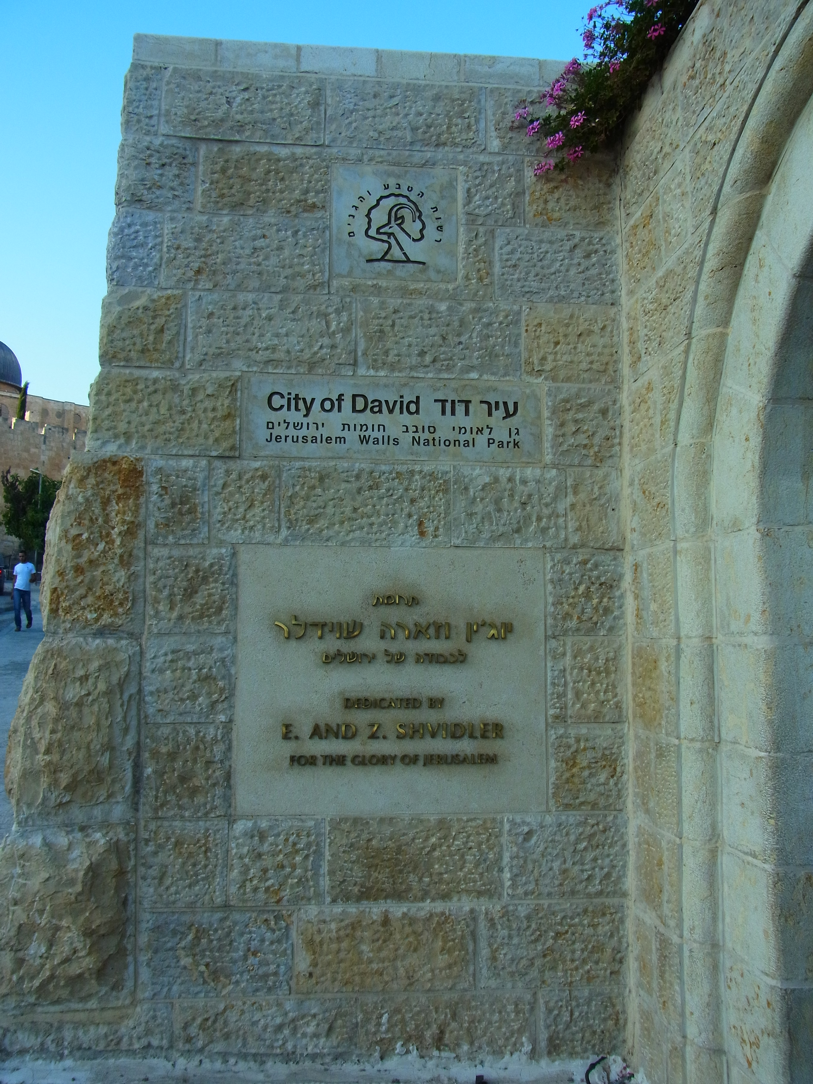 中文（香港）: 位於現耶路撒冷城旁的大衛城